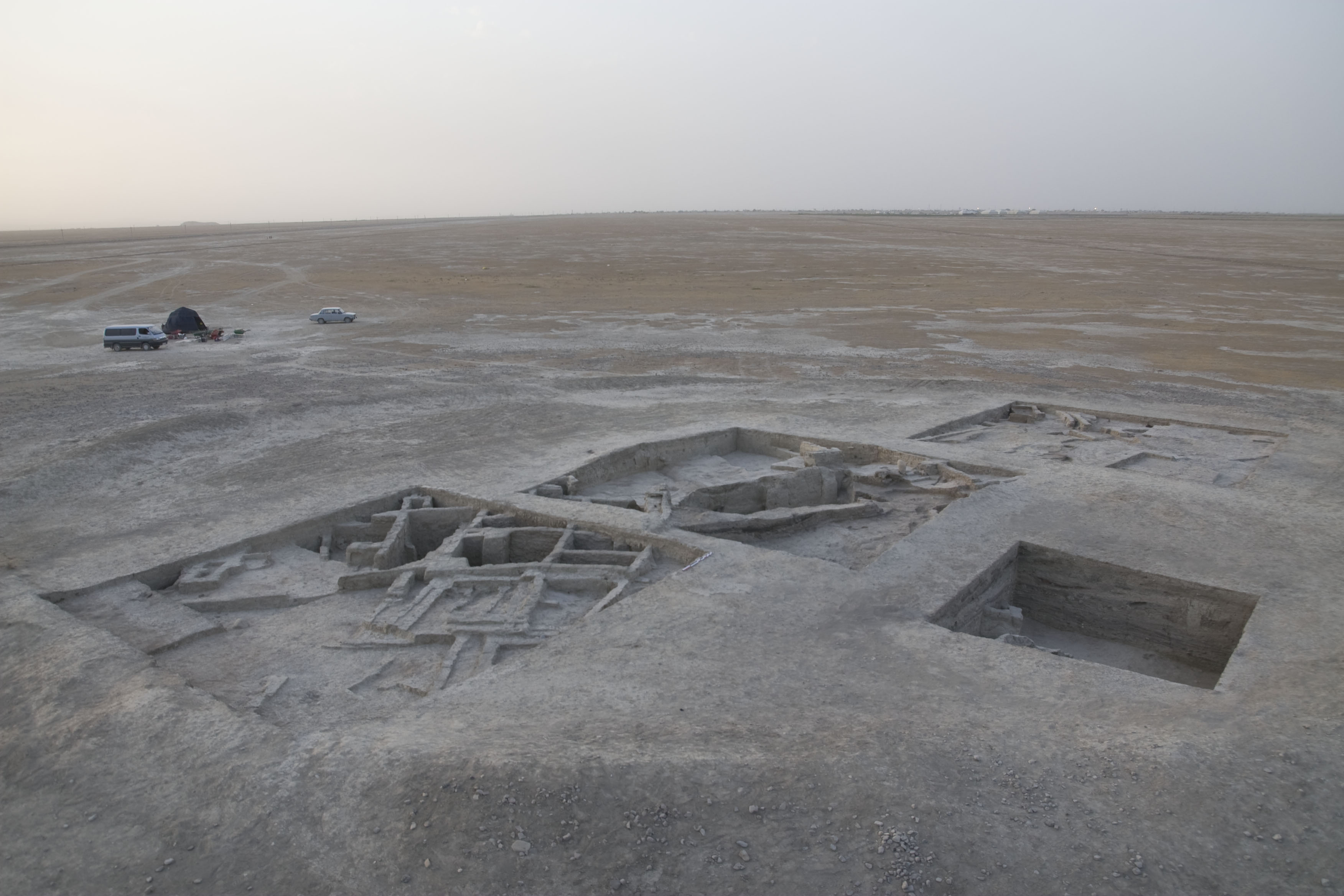 Das Foto zeigt eine von Südosten geschossene Aufnahme, welche die Units B, C, D und E abbildet.